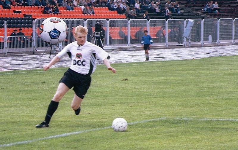 Фотография с диска Анастасии Федоренко «Донецк. Увидеть и полюбить». ФК «Шахтёр» Донецк